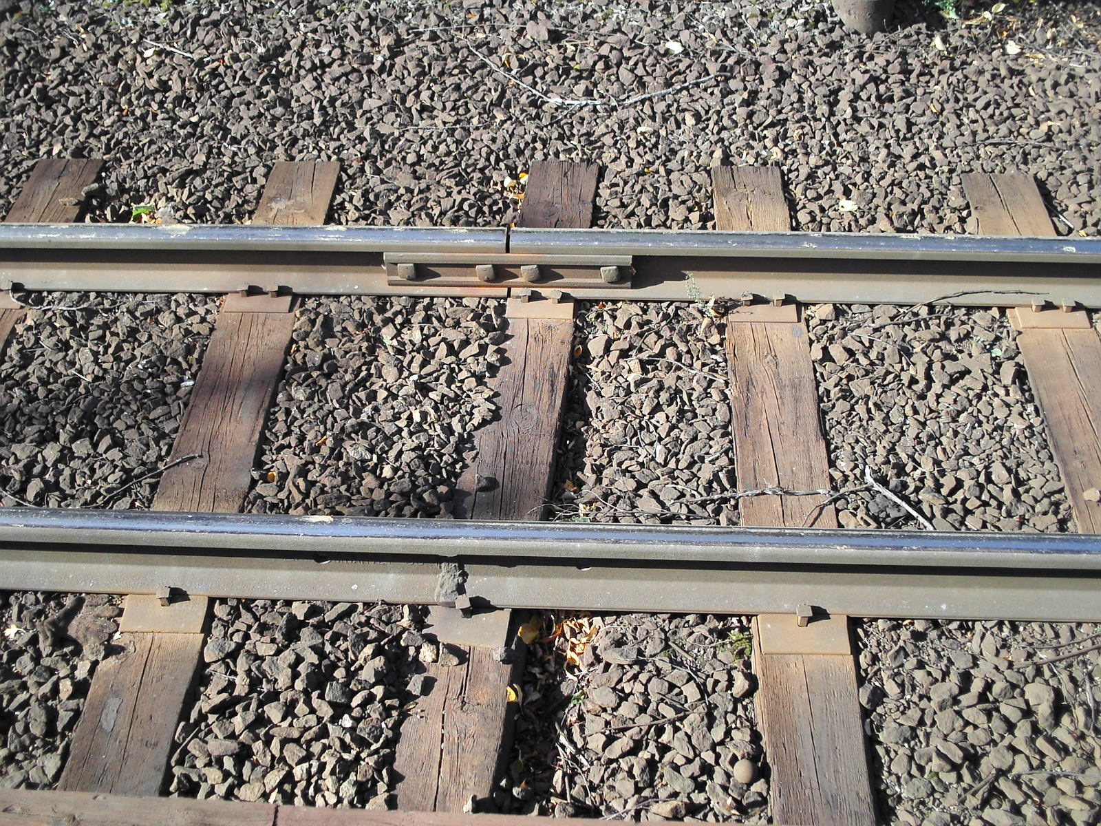 Rälsskarv på Roslagsbanan